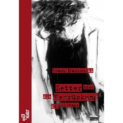 Umschlag-Illustration: Jin-A Ryou